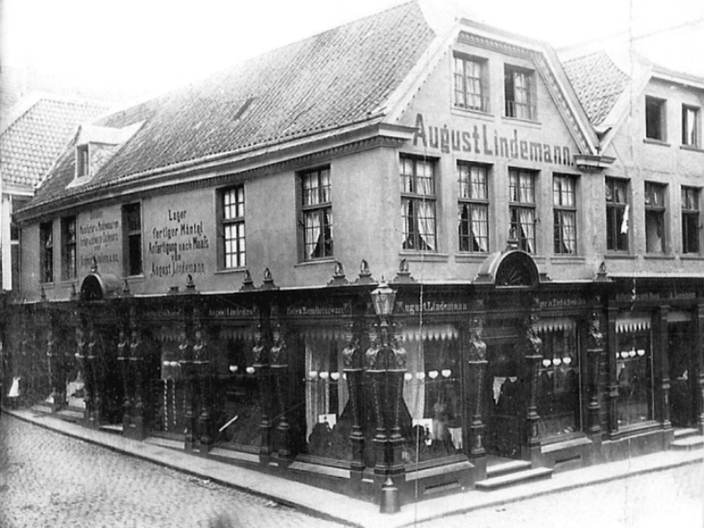 Geburtshaus des Industriellen Alfred Krupp und seines Vaters Friedrich Krupp in Essen